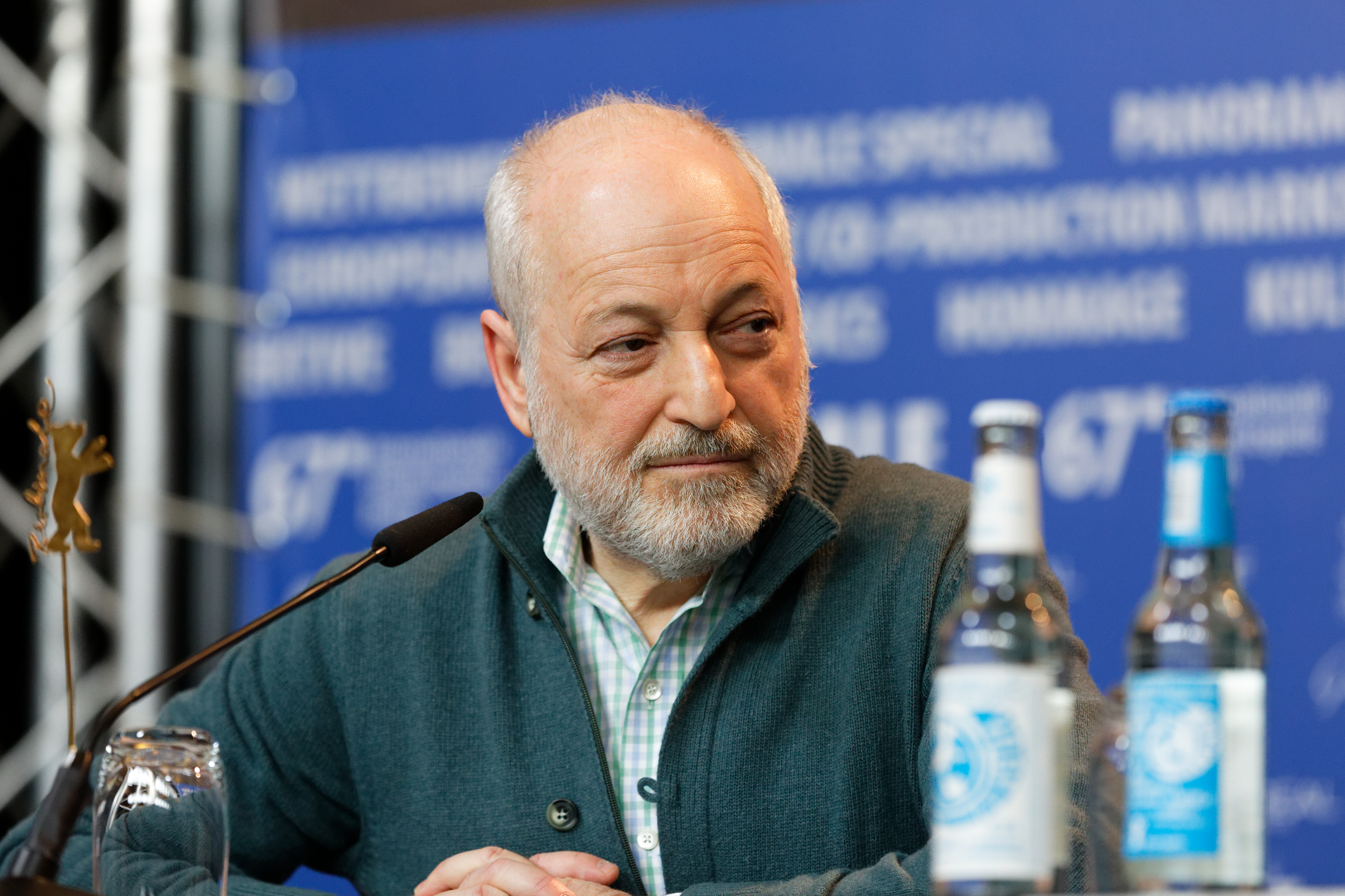 André Aciman bei der Pressekonferenz zu Call Me By Your Name bei der Berlinale 2017